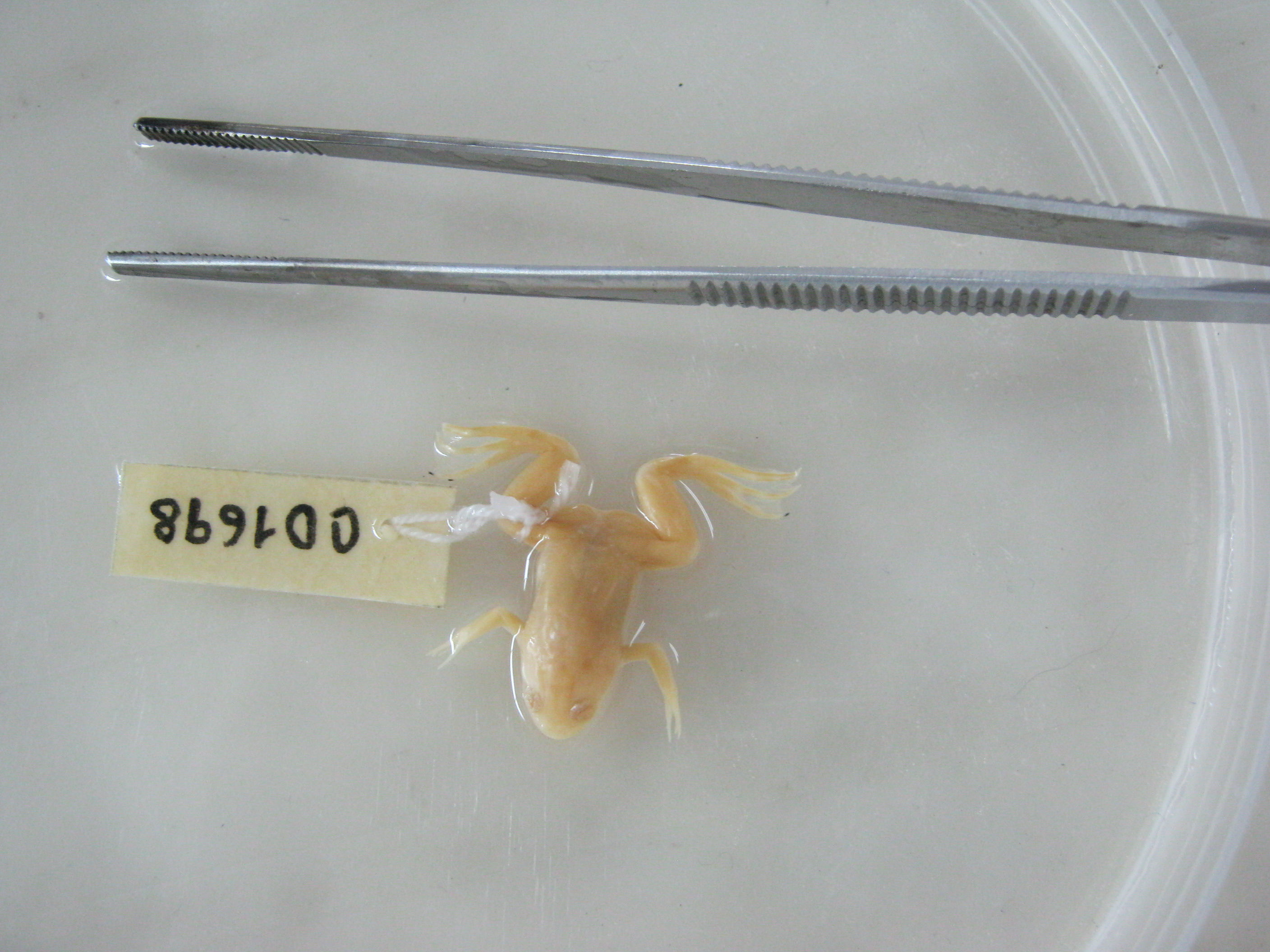 Pequeños espécimen de Xenopus laevis